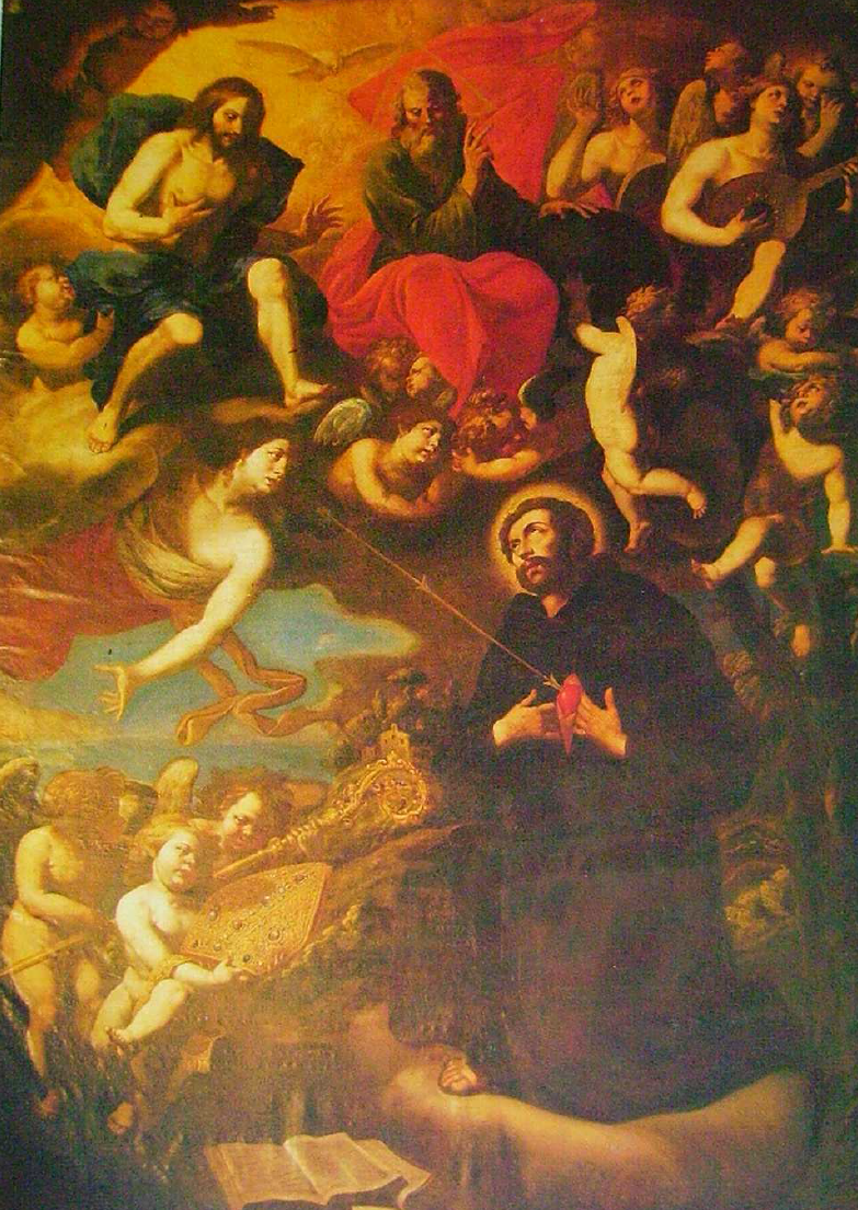 Agostino Beltrano: San Agustín. Óleo sobre lienzo, 355 x 258 cm,colección particular, Valverde de Miranda (Burgos). Firmado "Agostino Beltranus 1656"